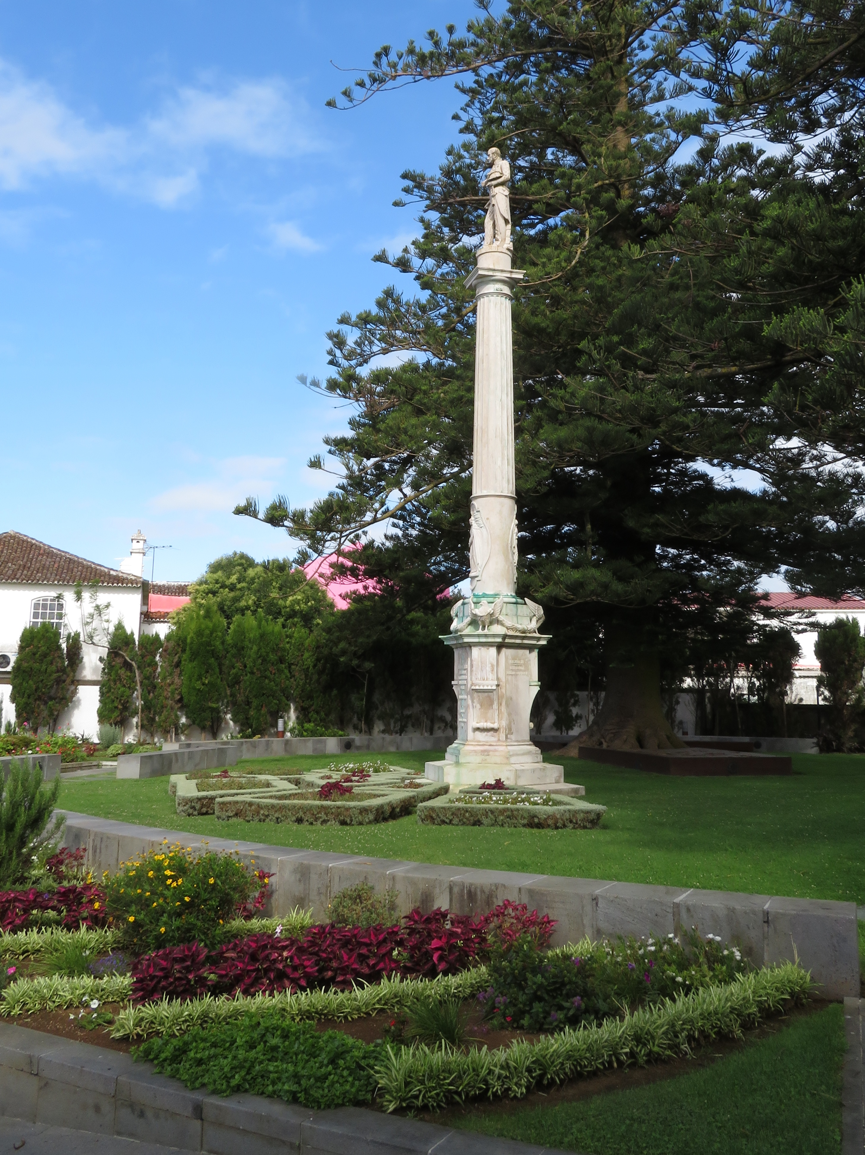 Stadtgarten mit Denkmal für José Silvestre Ribeiro, Praia da Vitória, Insel Terceira, Azoren,Portugal